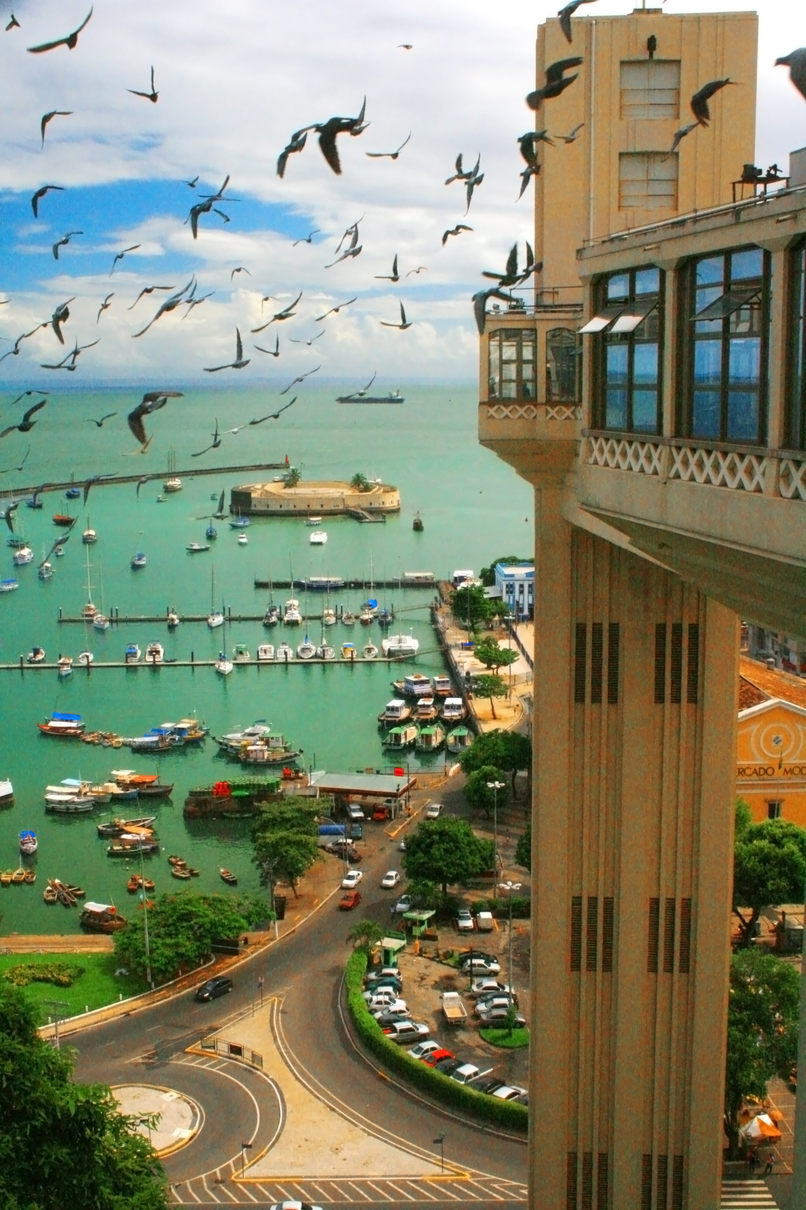 Elevador Lacerda - Salvador